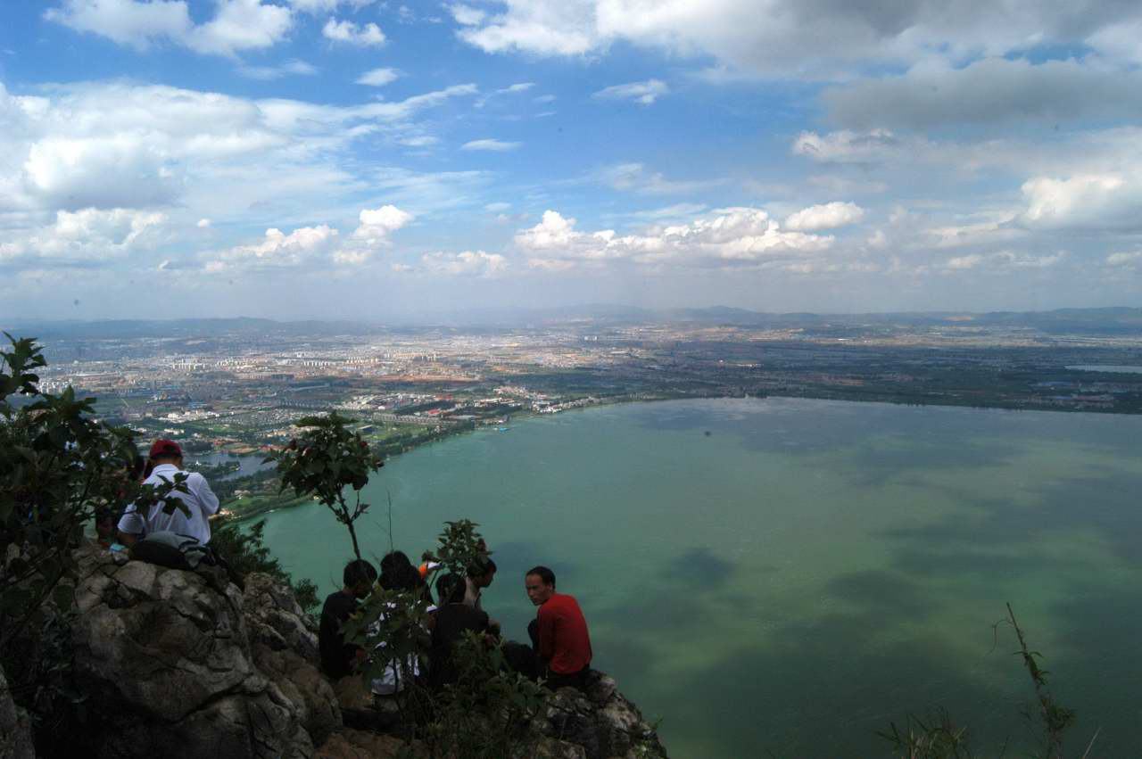 Dianchi Lake